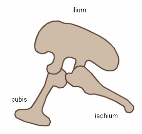 Saurischia pelvis structure (left side).